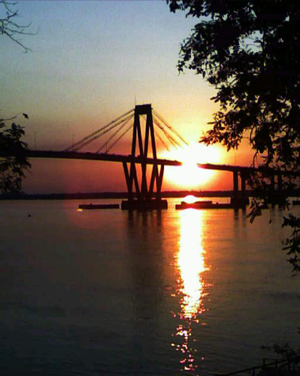 El Puente General Belgrano de la ciudad de Corrientes Argentina